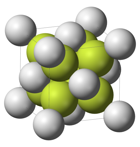 A cropped fluorite unit cell